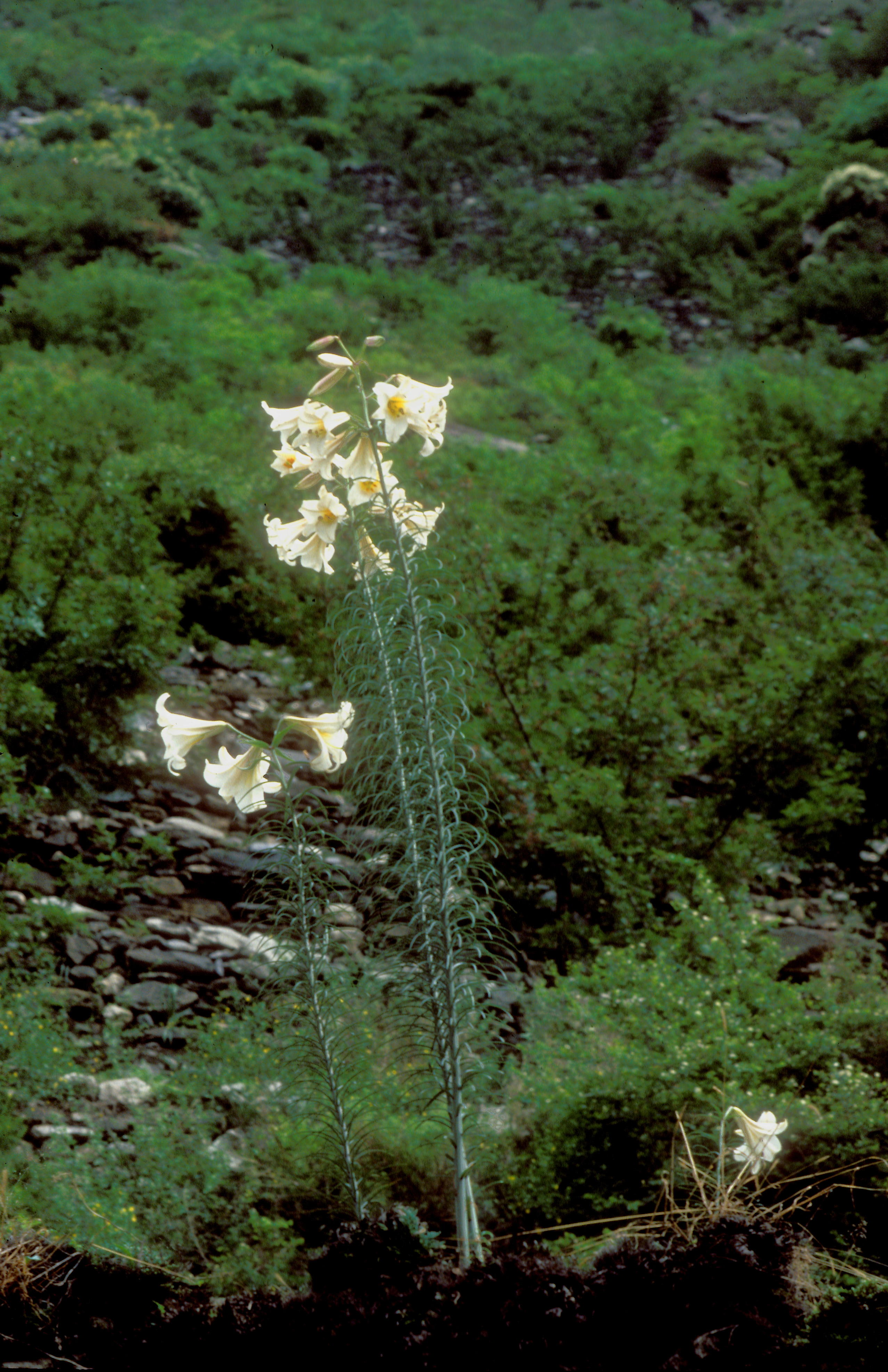 Lilium regale in habitat, Wolong, Sichuan, China